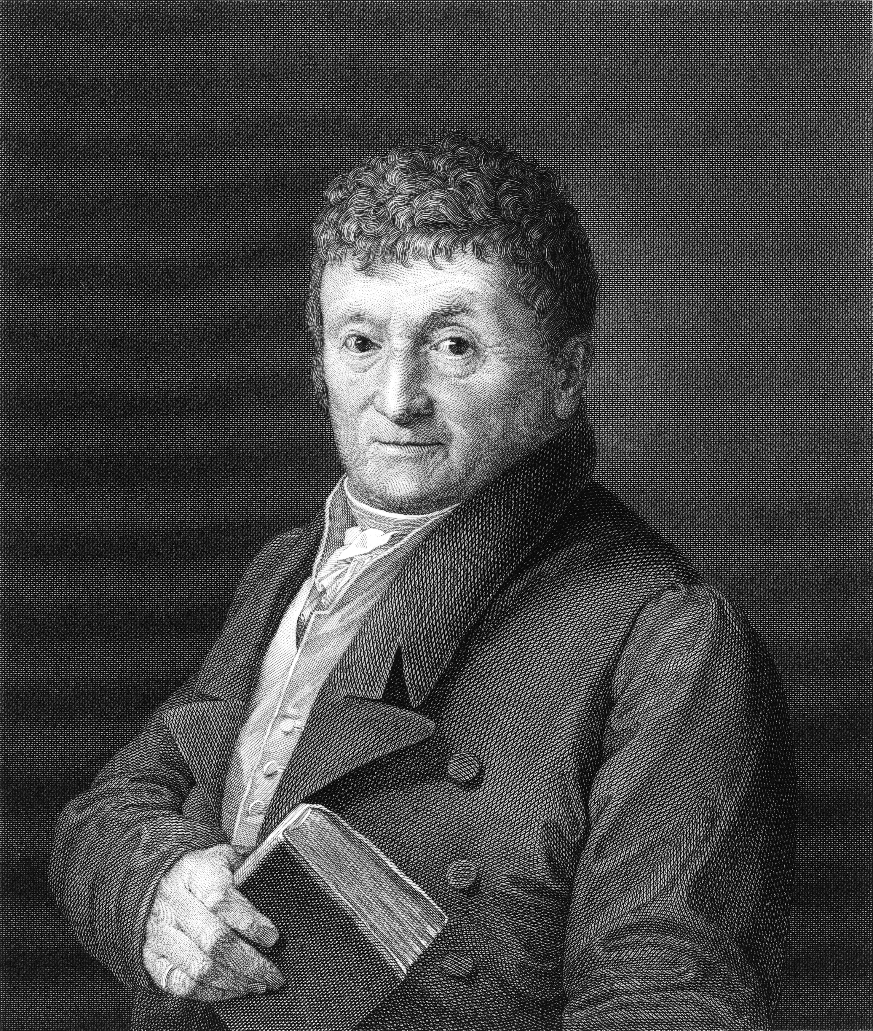 Depicted person: Karl Tauchnitz